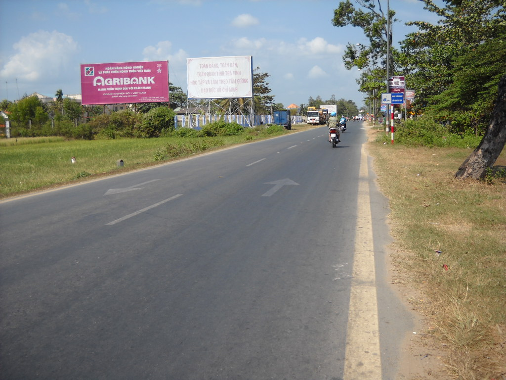 Thể loại:Quốc lộ Việt Nam